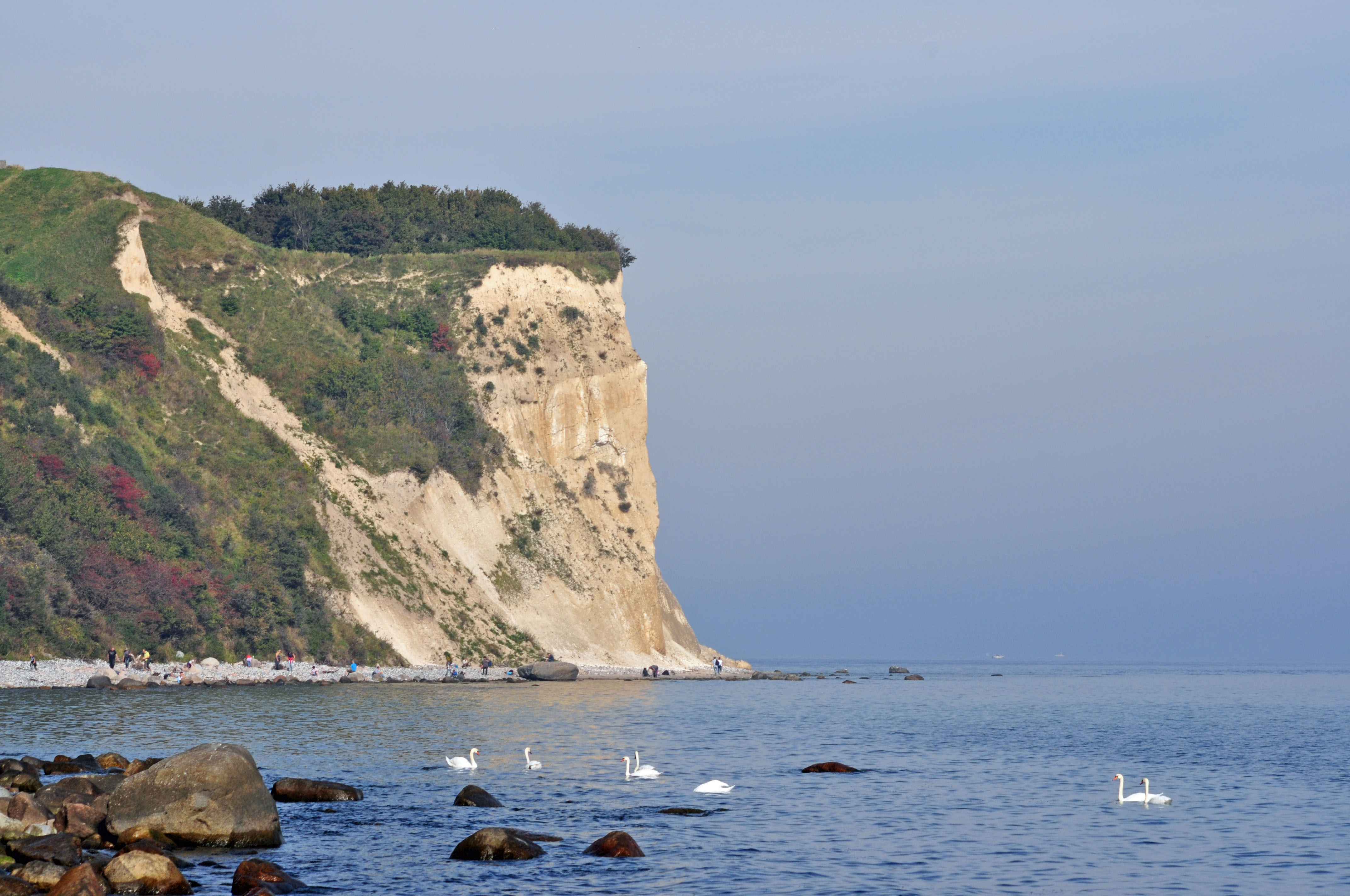 Aufgenommen am Strand zwischen Vitt und Kap Arkona.